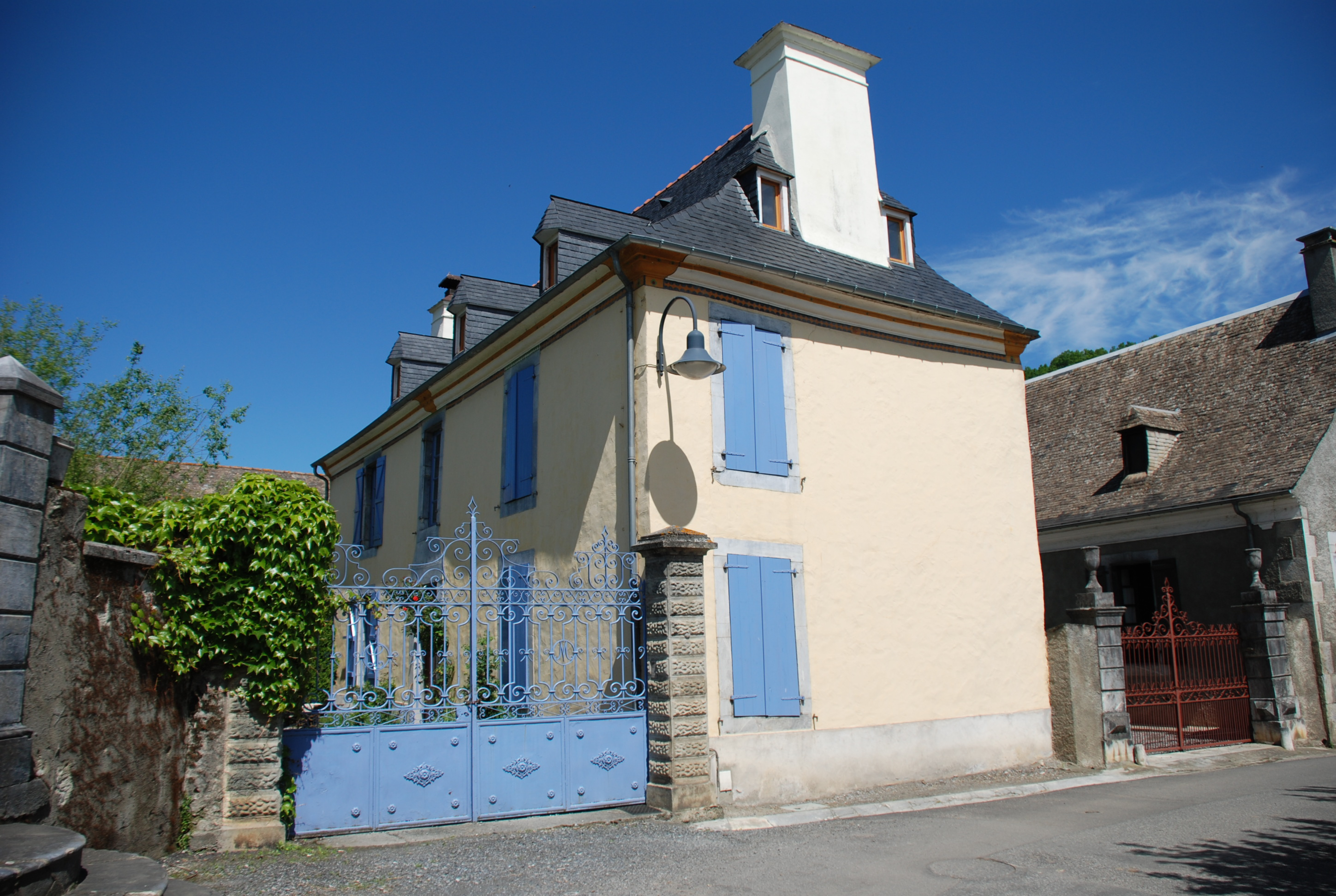 Maisons bigourdanes à Lézignan, l'une à étage (En ço de Mounic) et l'autre à rez de chaussée (En ço de Cousi)